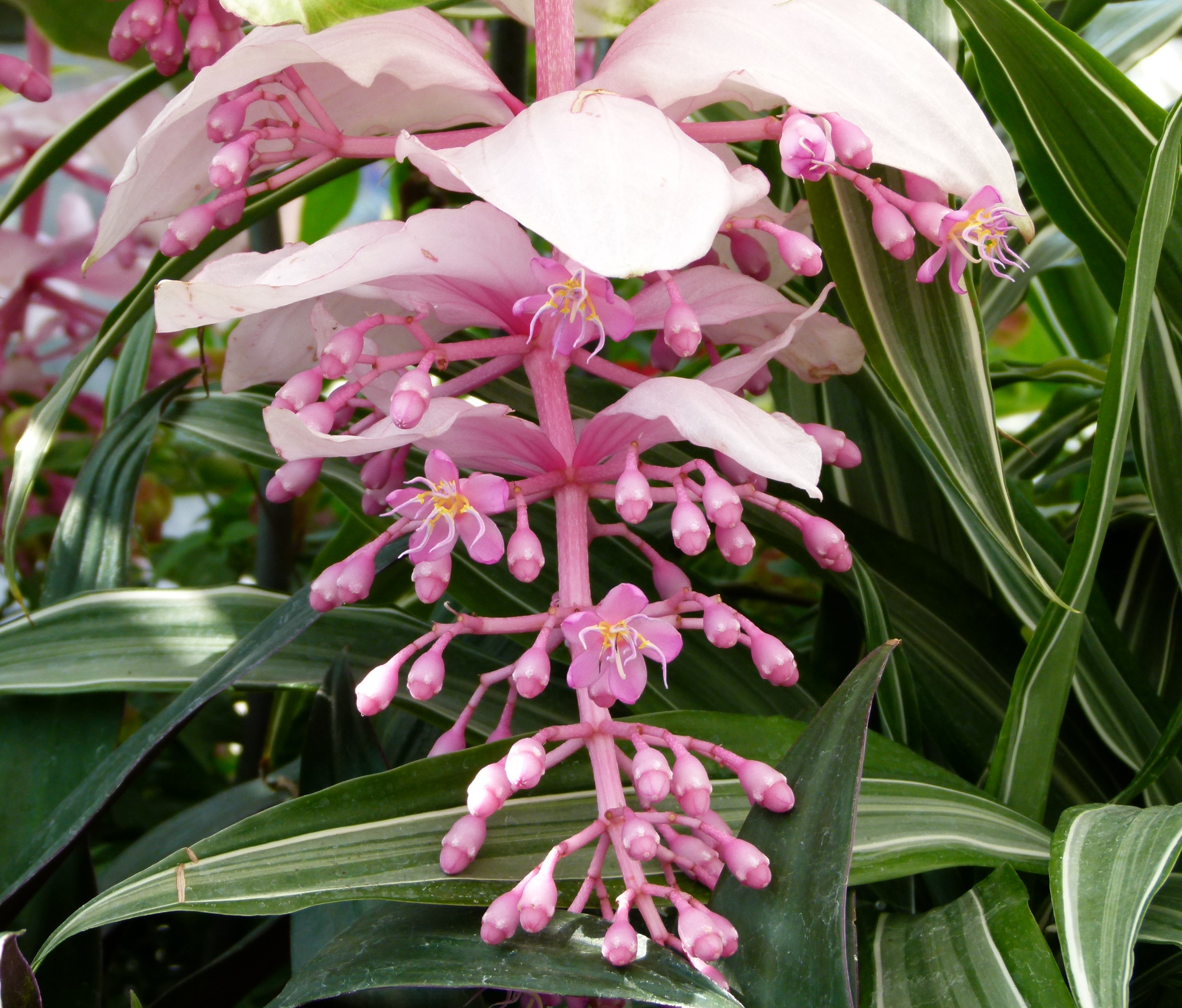 Pink flower unidentified plant